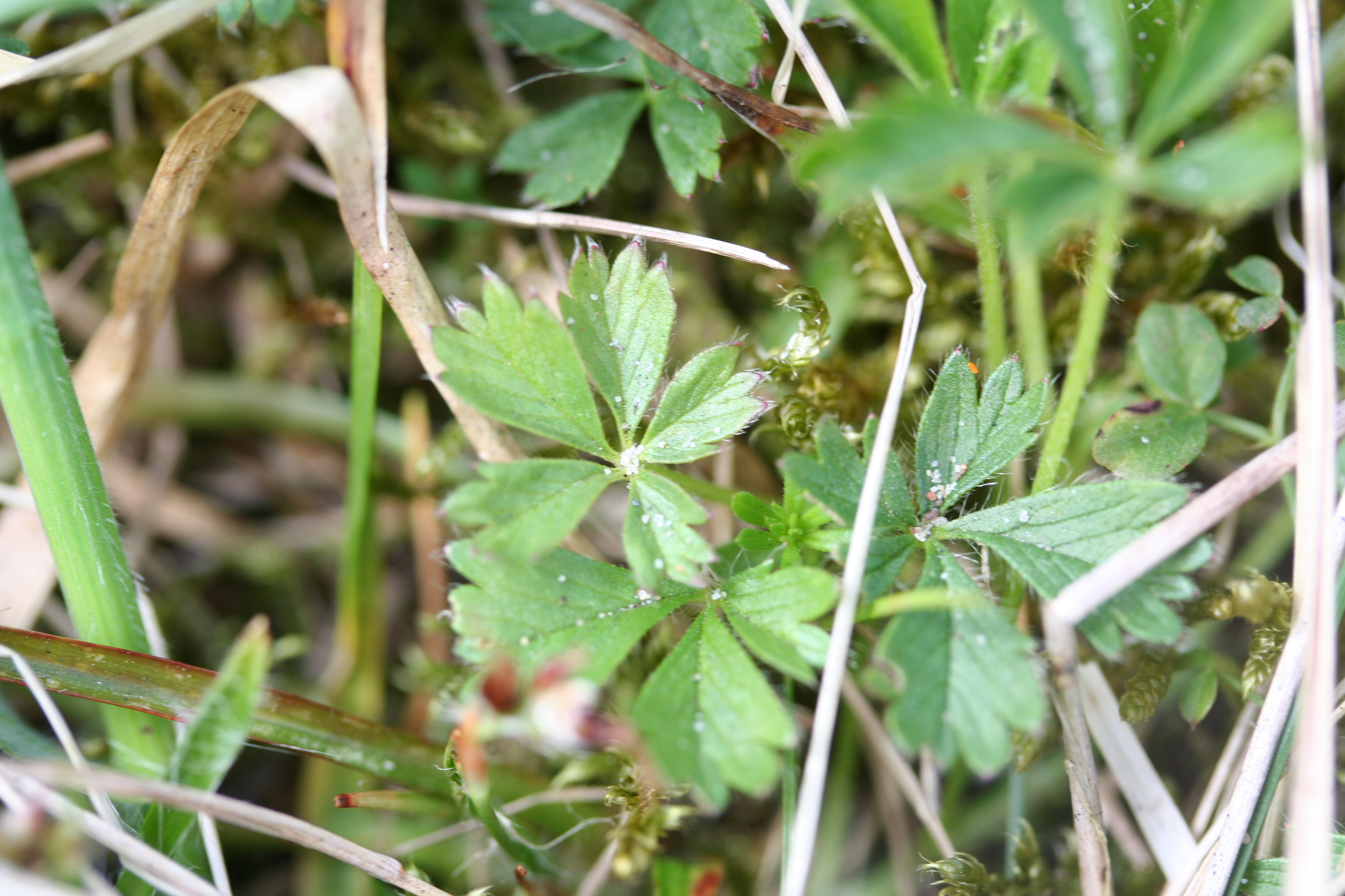 blad van same plant as image:Unidentified-03 (xndr).jpg